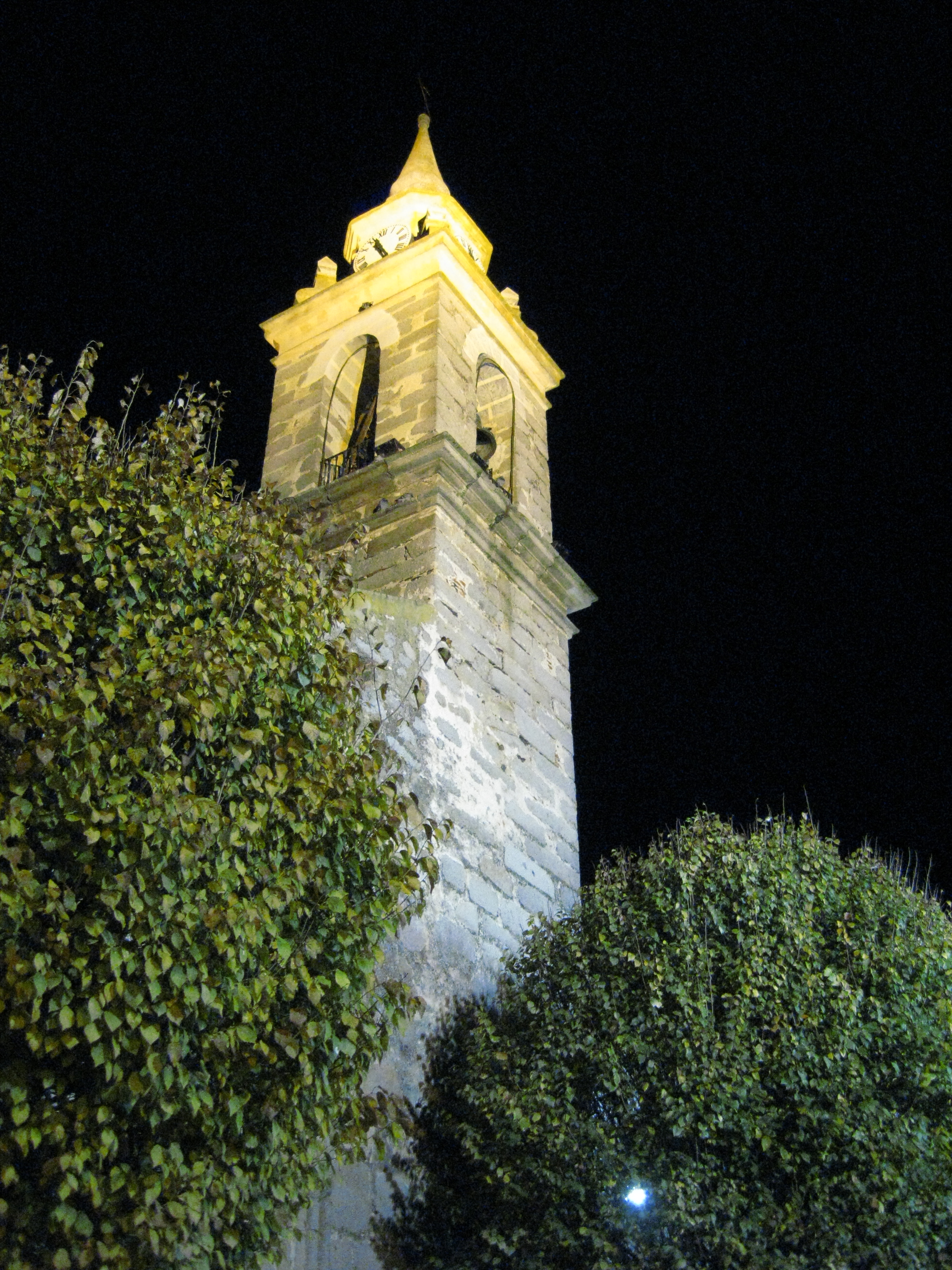 Imagen de la torre de la Iglesia de San Pedro. Noviembre de 2011